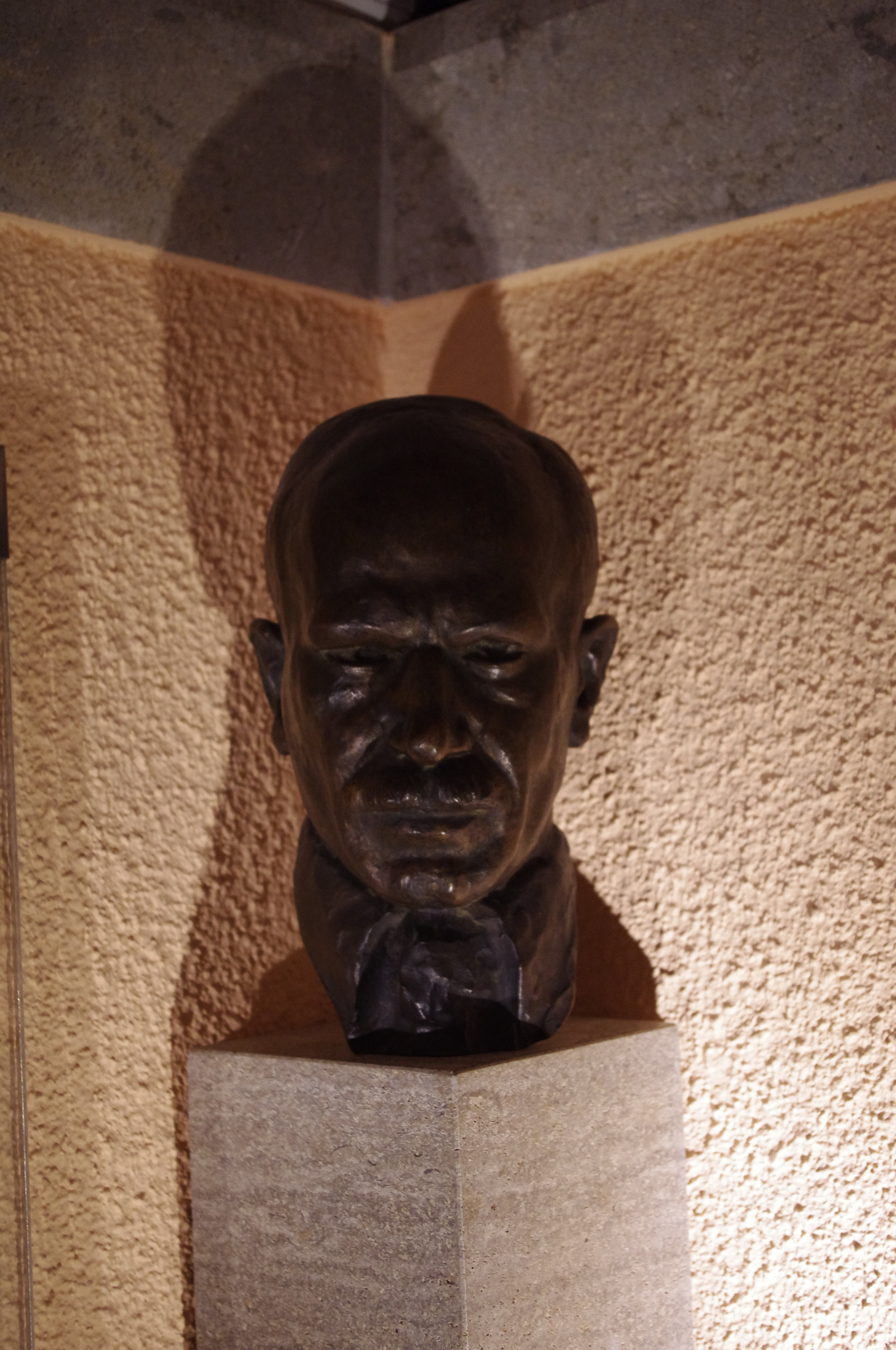 Büste von Edmund Körner, dem Architekten der Alten Synagoge